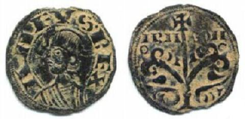 Dinero jaqués de Alfonso I de Aragón (1104-1134). Anverso: busto del rey, Leyenda. ANFUS-REX-ARA-GON. Reverso: Cruz procesional sobre vástago con florituras de ramas a los lados sumada de cruz(mal llamada "Encina de Sobrarbe", como se interpretó desde el siglo XVI).